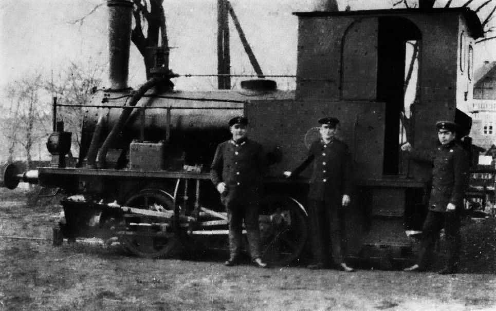 Dampflok der Stadtbahn Boizenburg